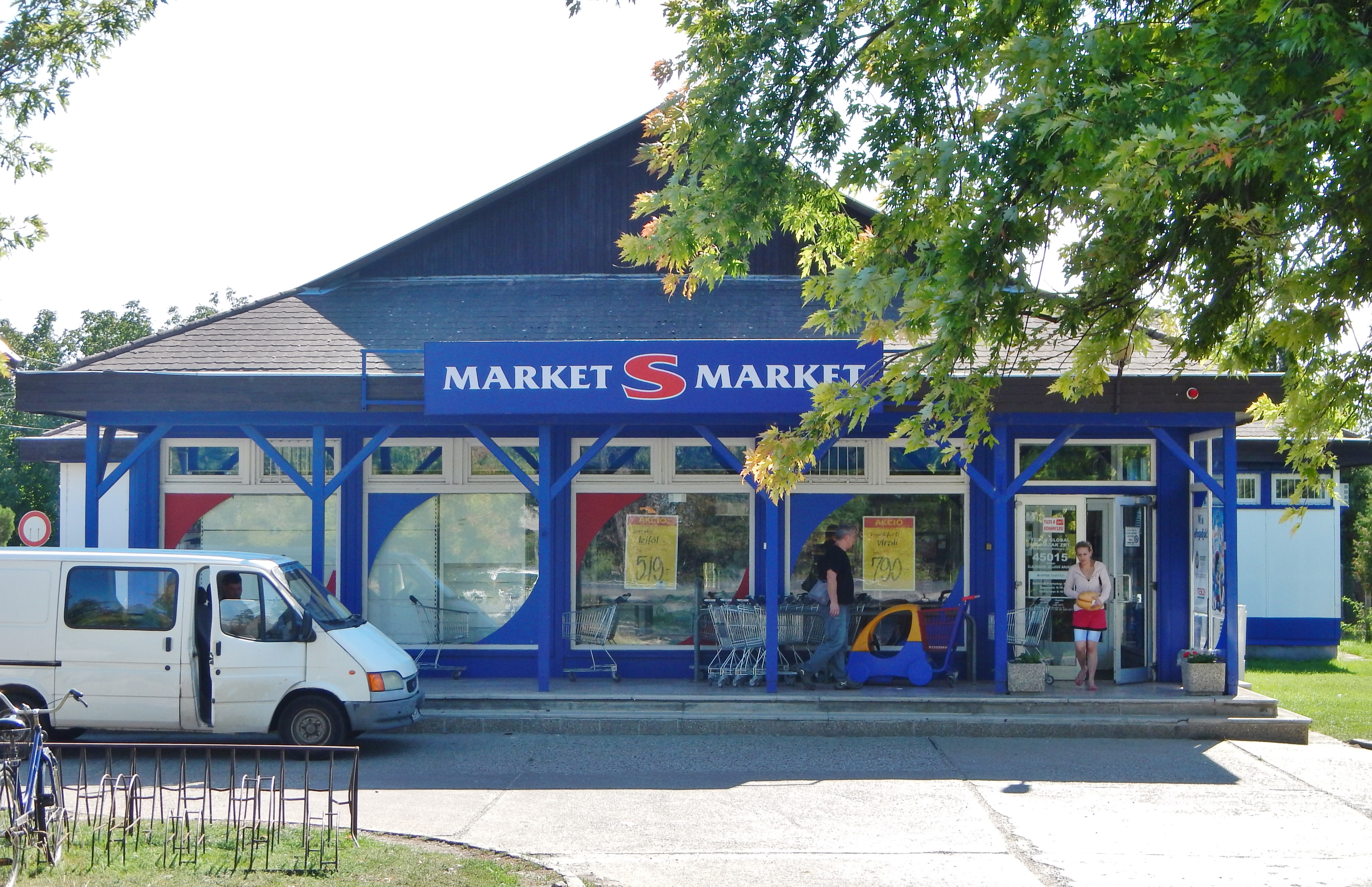 S-Market at Levél